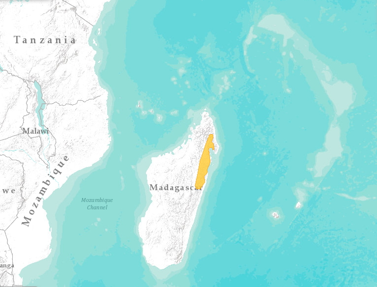 Карта поширення Platypelis barbouri